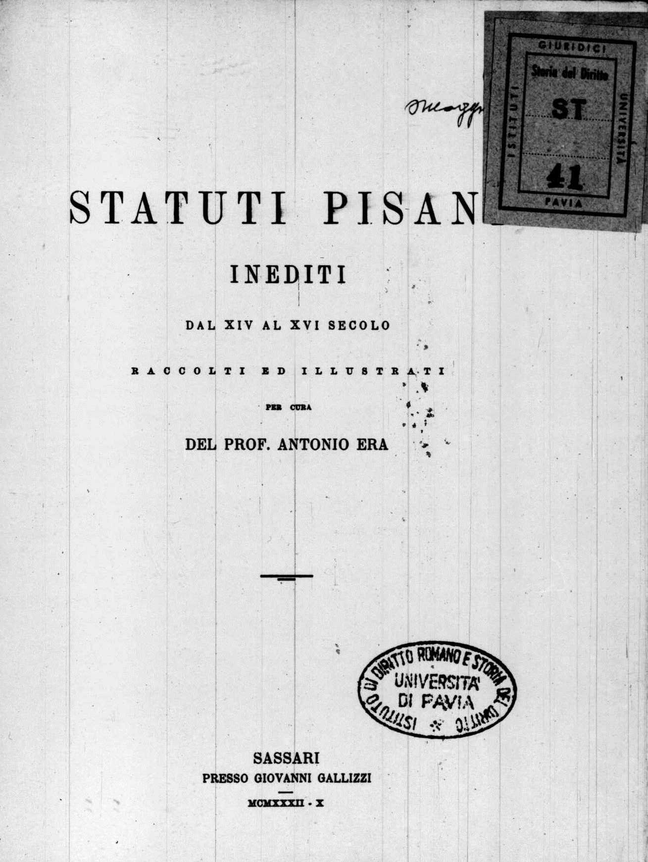 Frontespizio